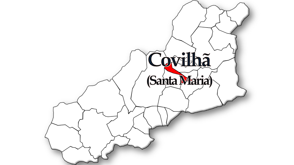 População